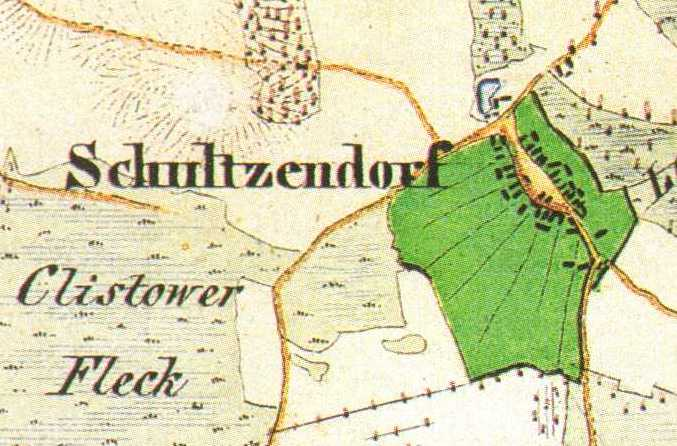 Klein Schulzendorf, Stadt Trebbin, Brandenburg, Deutschland, Urmesstischblatt Blatt Woltersdorf 3845, von 1841